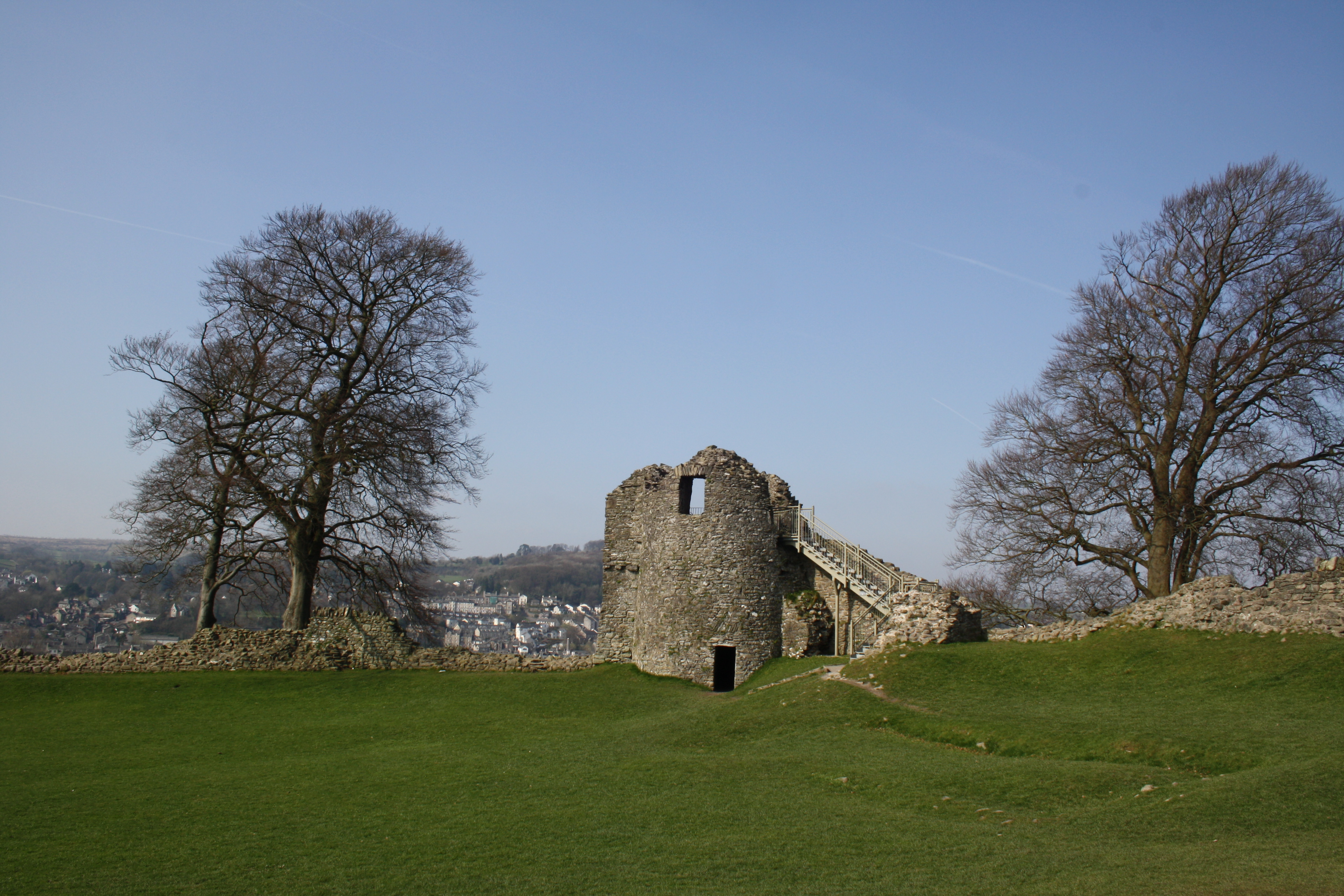 Kendal Castle